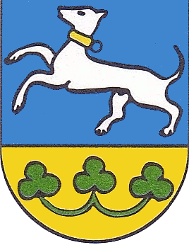 Wappen von Inzersdorf im Kremstal, Oberösterreiche